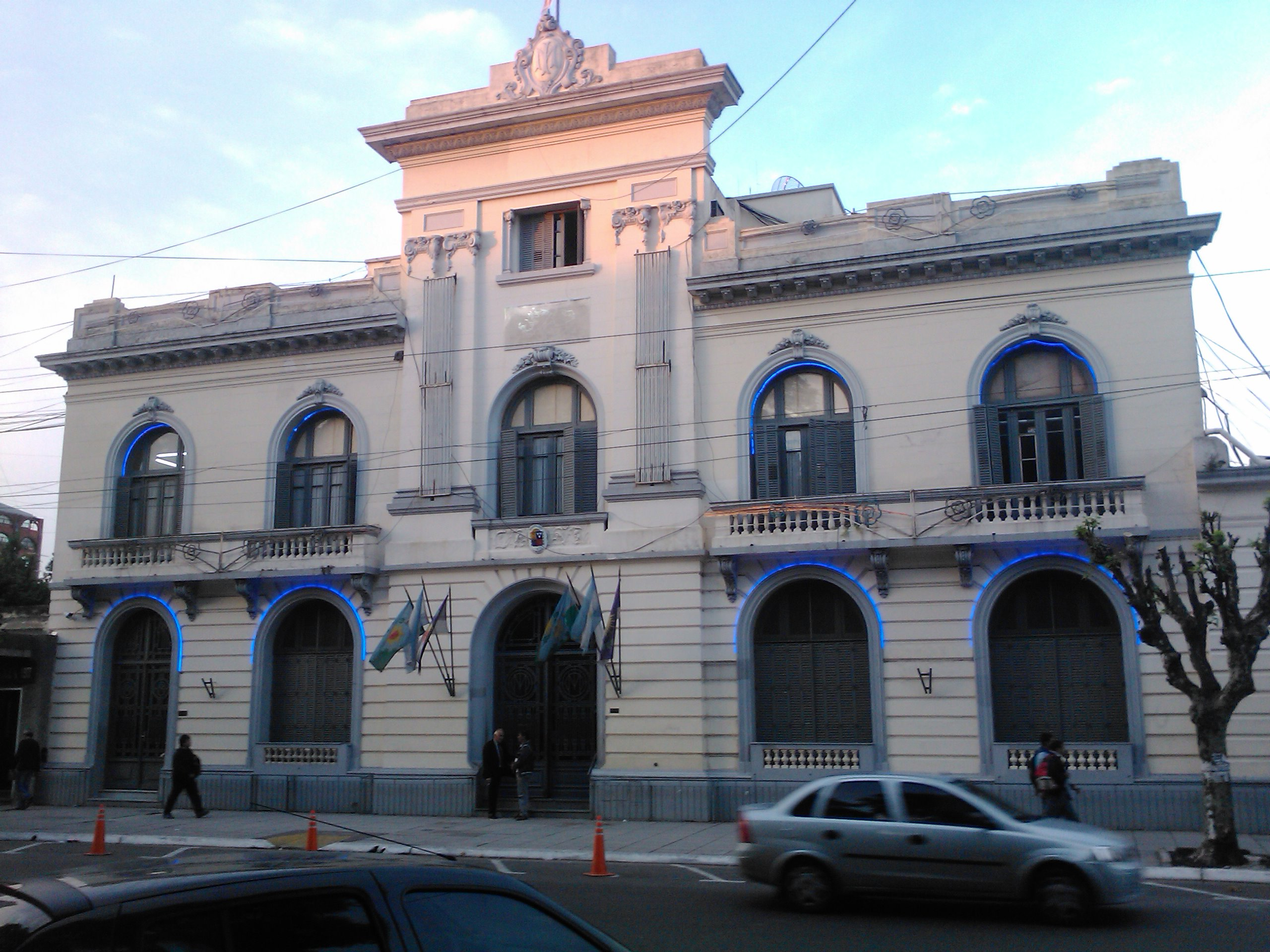 Municipalidad de La Matanza. Almafuerte 3050, San Justo, Prov. de Buenos Aires.